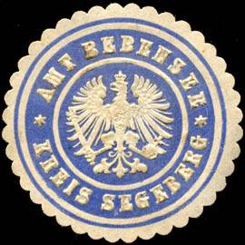 Sealing stamp Title: Amt Bebensee - Kreis Segeberg Description: blau, weiß, geprägt Place: Bebensee size: 4 cm